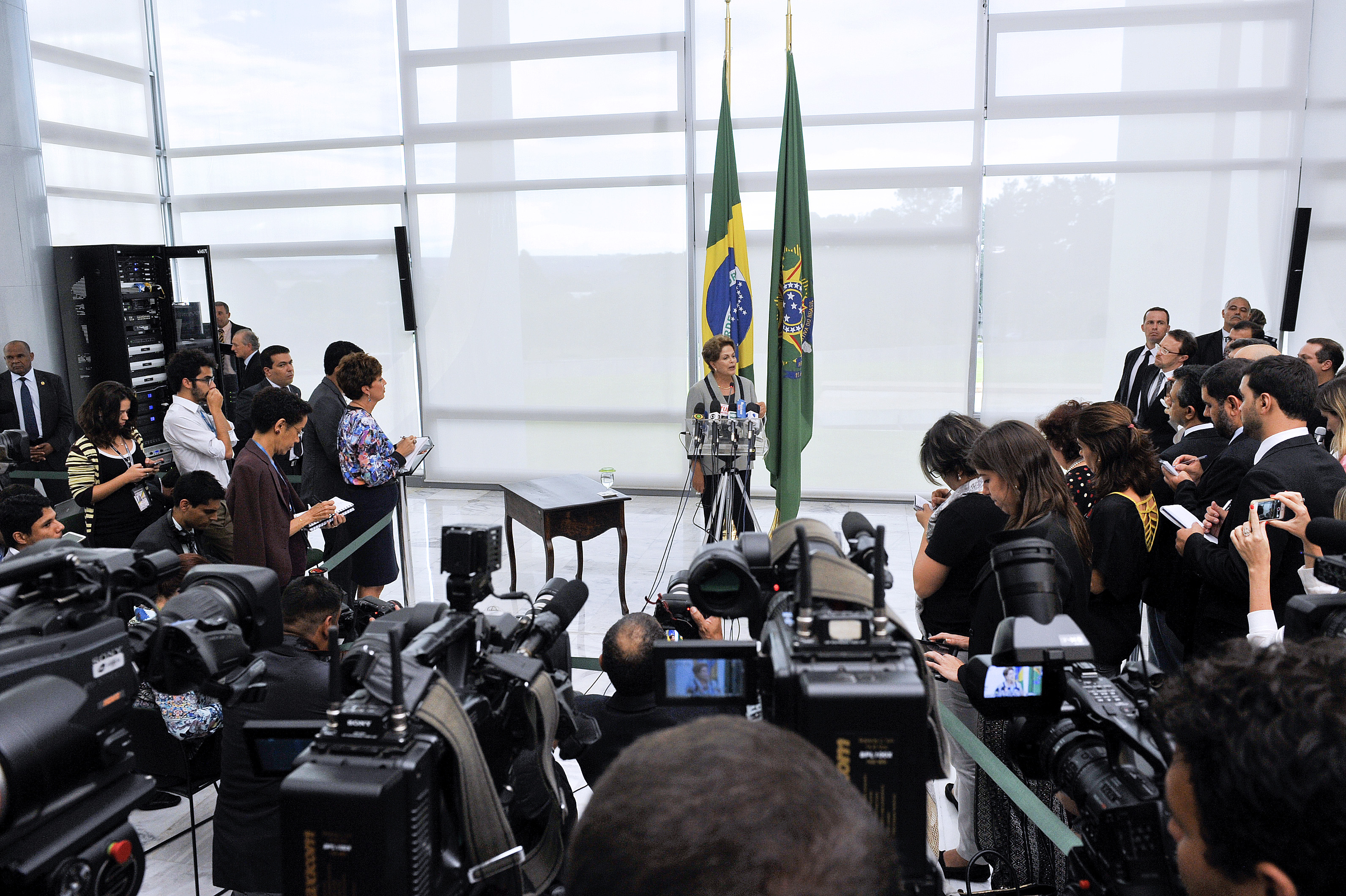 A presidente da República Dilma Rousseff concede entrevista coletiva no Palácio do Planalto. Foto: Jonas Pereira/Agência Senado